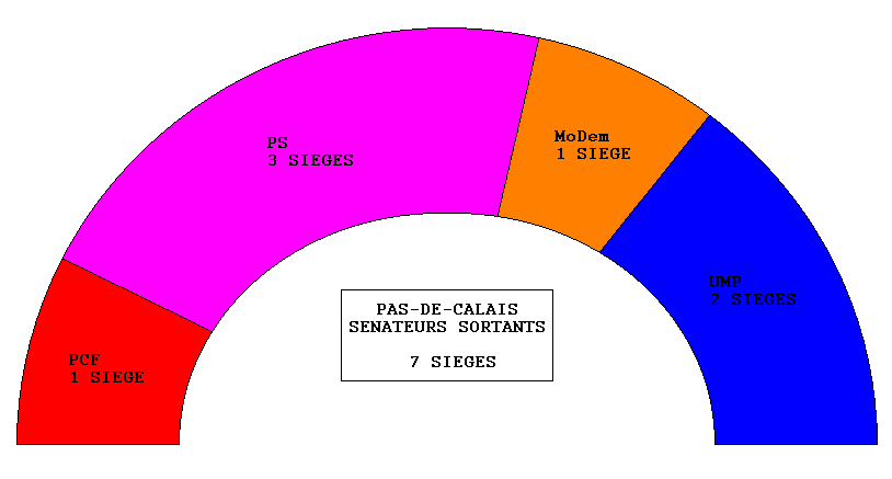 Sénateurs sortants élus en 2001.